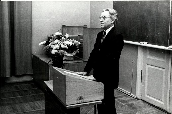 PF0015 TÜ EMSA Huno Rätsep kõnet pidamas.